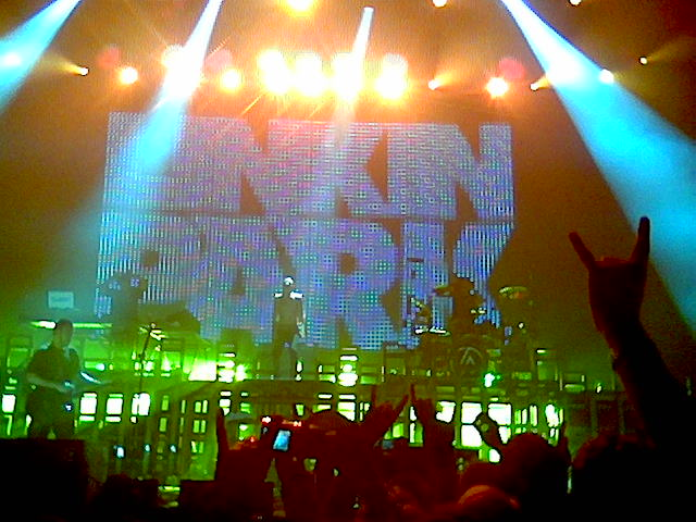 Koncert i Forum København den 24. maj 2007.